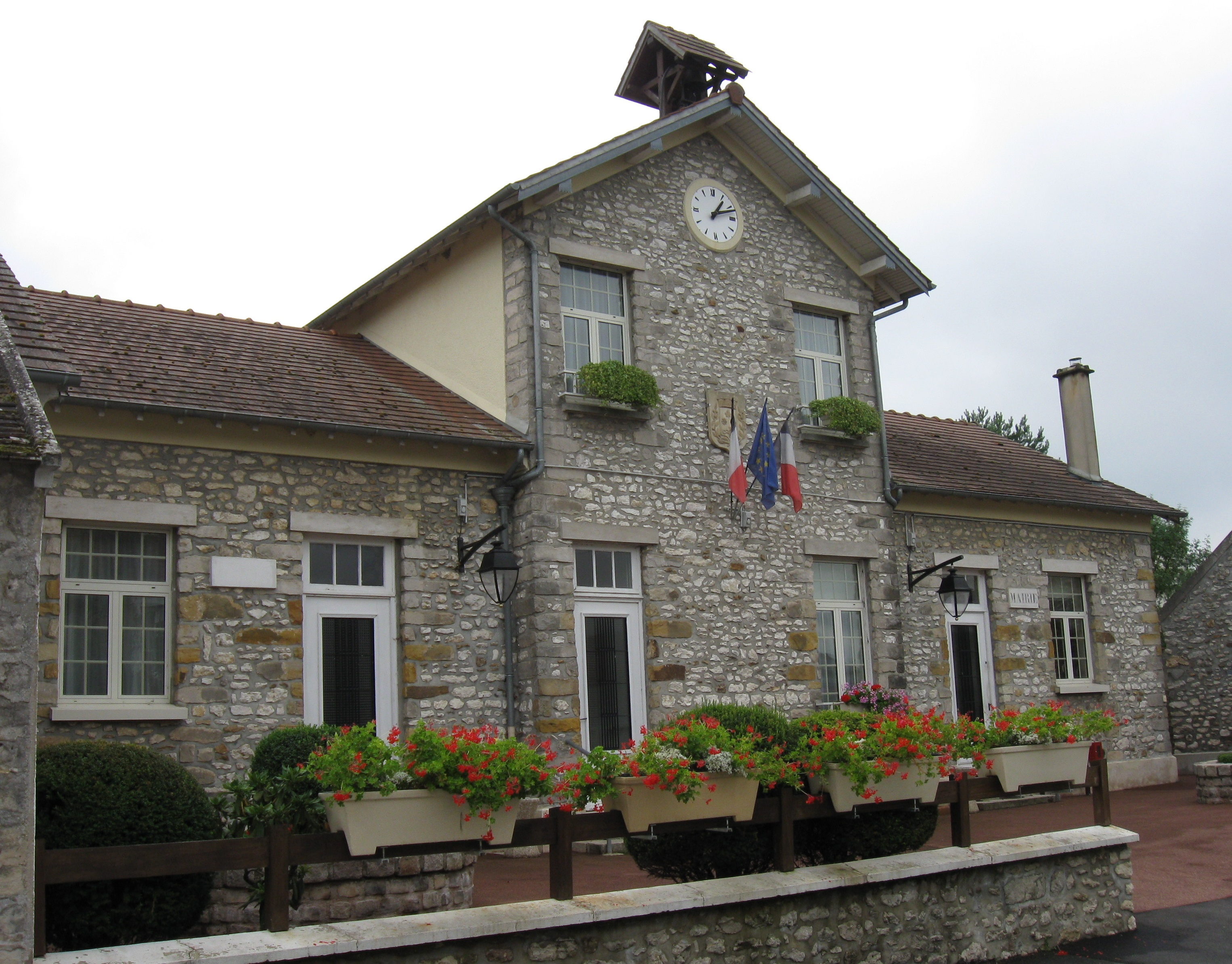 Mairie de Pamfou. (Seine-et-Marne, région Île-de-France).